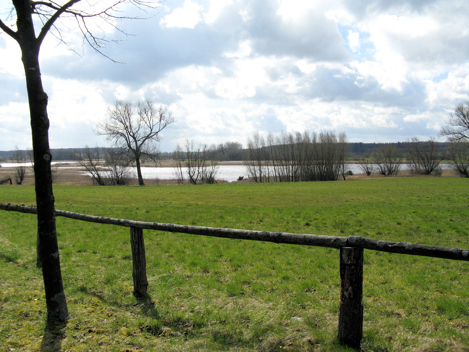 NSG Langenhägener Seewiesen, Kranichrastplatz, IGA 2003- und BUGA 2009-Außenstandort im Landkreis Parchim, Mecklenburg-Vorpommern